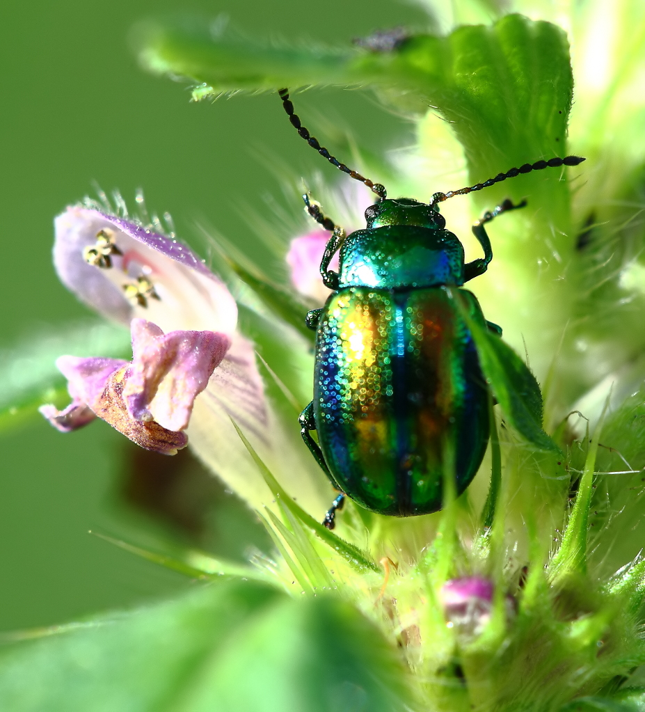 Sachsen, Waldrand: Prächtige Blattkäfer oder Goldglänzende Blattkäfer (Chrysolina fastuosa)